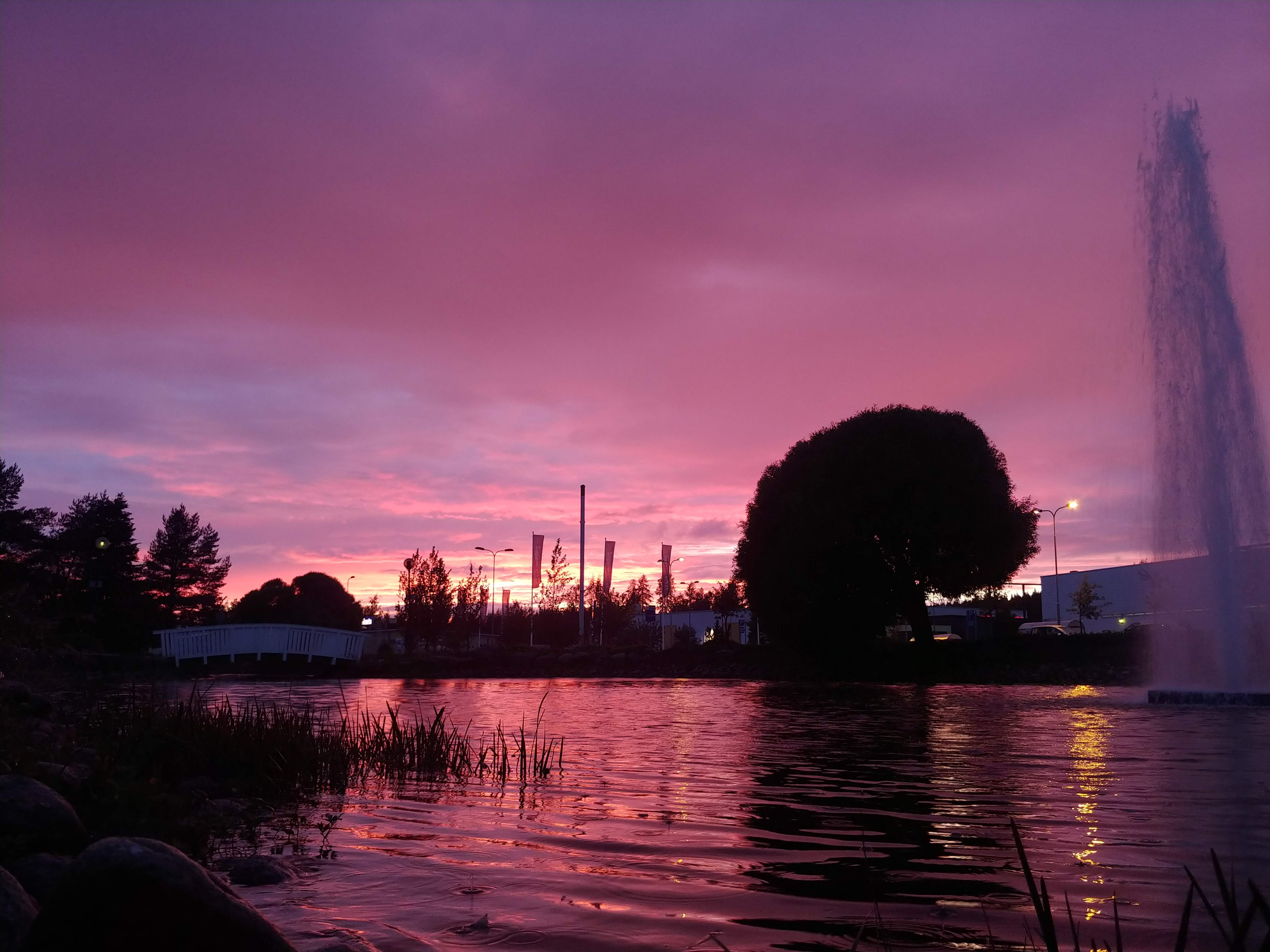 Kuvassa näkyy otsikon mukainen lampi ja sen rantoja